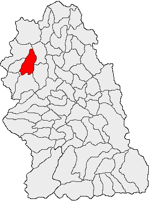 Categorie:Hărţi ale judeţului Hunedoara